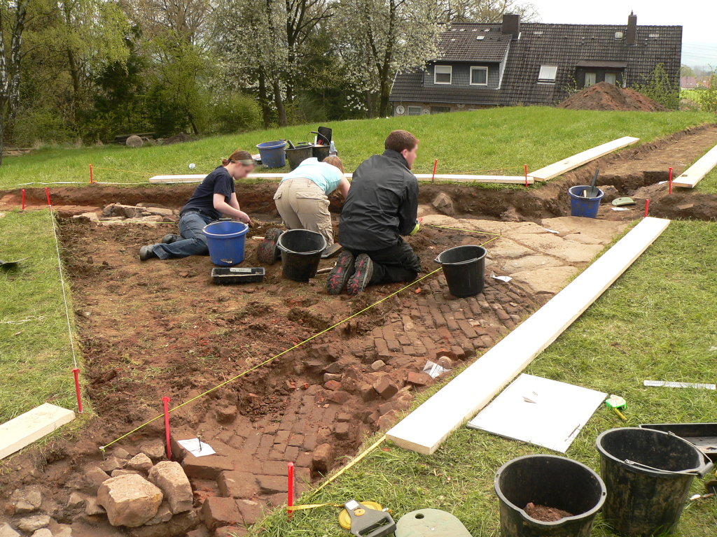 Ausgrabung Glashütte Klein Süntel mit freigelegter Bodenpflasterung aus Ziegel und hellen Sandsteinplatten